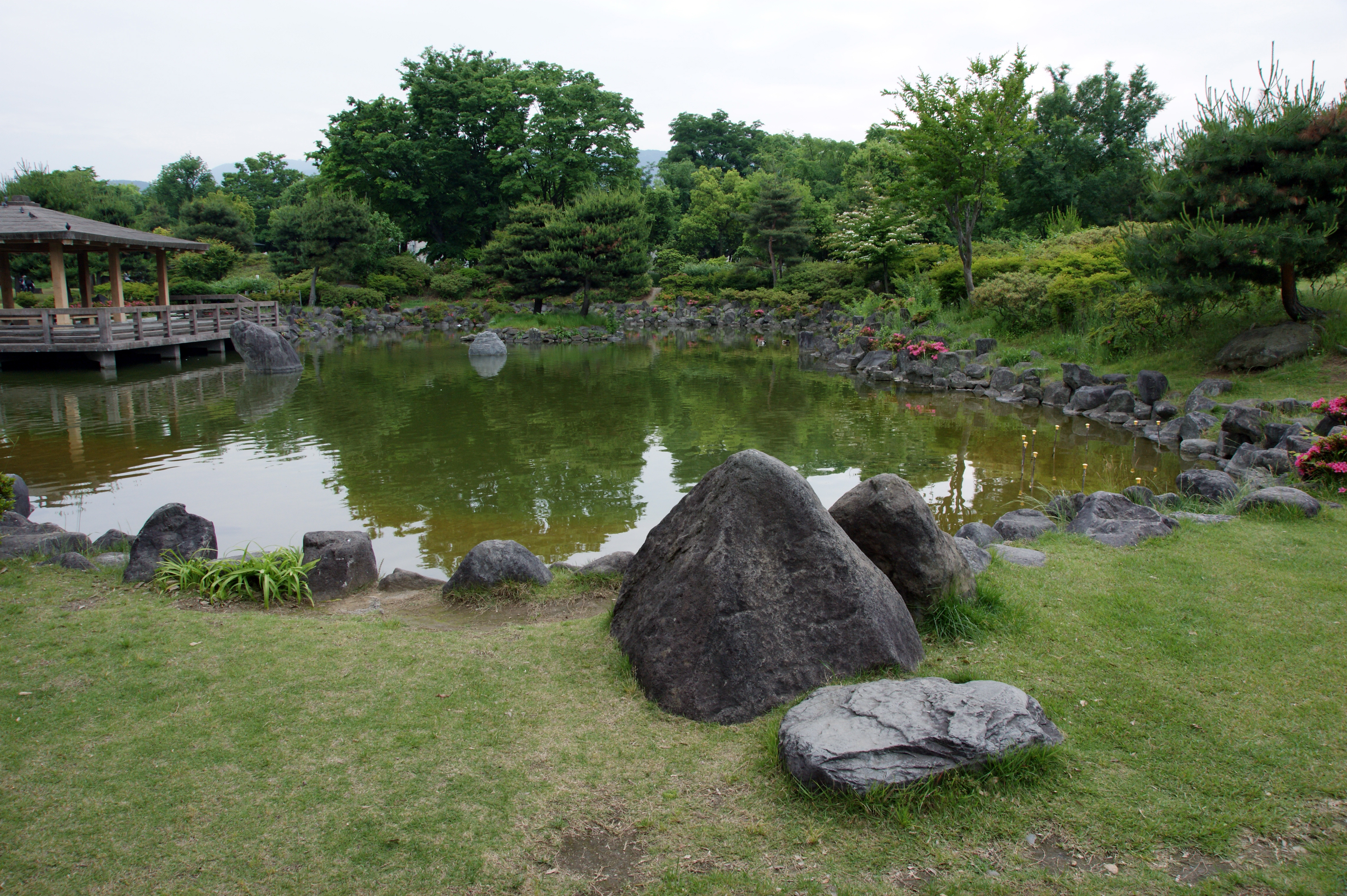 Agata-no-mori park in Matsumoto, Japan